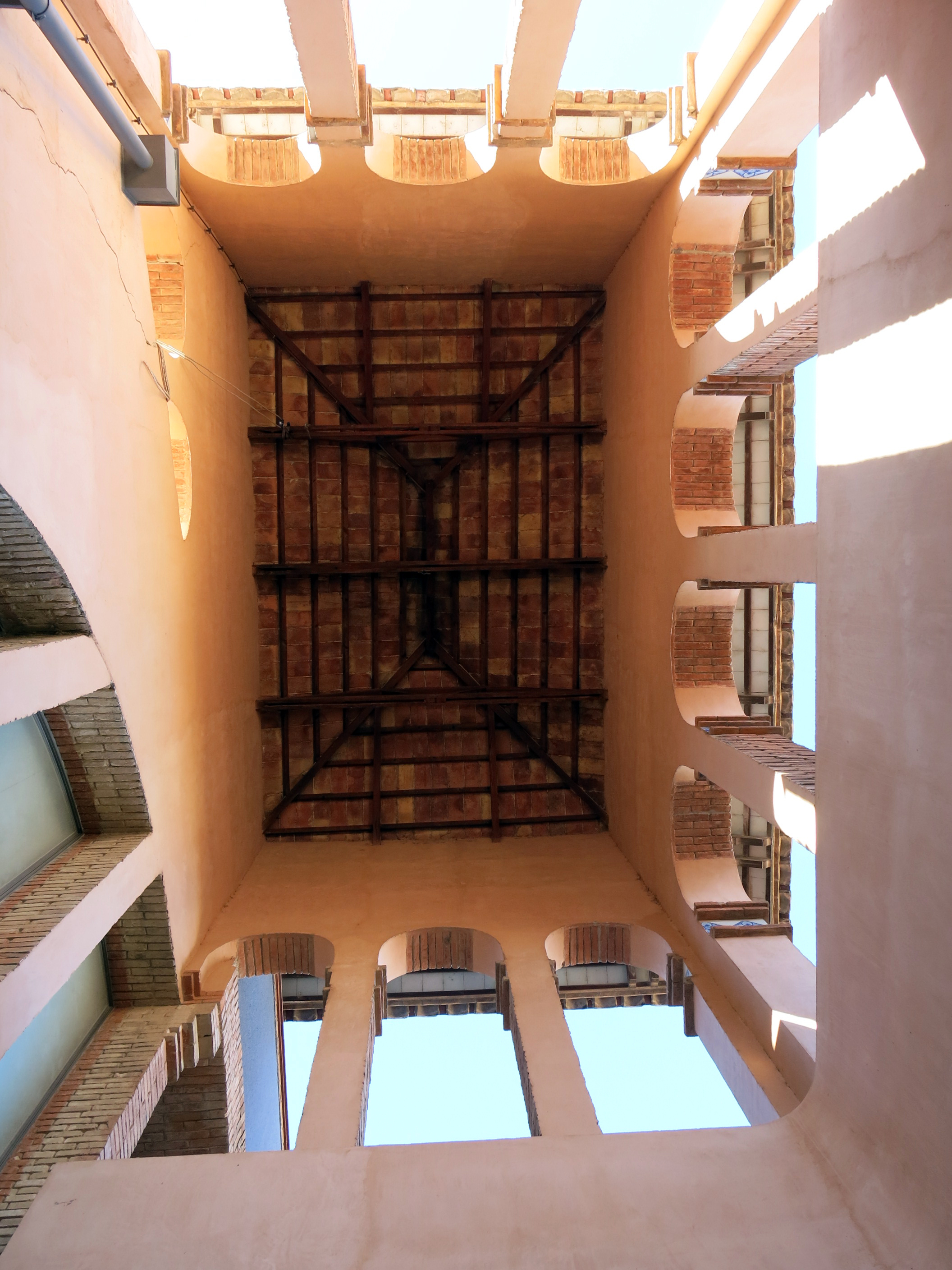 Museu de Tortosa, antic escorxador (Bigues i Riells)